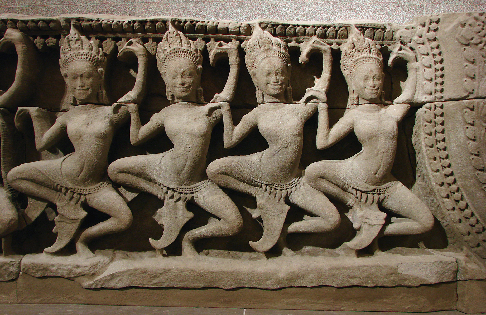 Apsaras, détail d'une partie inférieure de fronton. Cambodge, Bayon (Angkor Thom), province de Siemreap, style du Bayon, fin 12ème - début du 13ème siècle, grès. Musée Guimet,Paris.